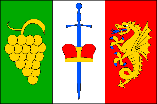 vlajka, Suchohrdly, okres Znojmo